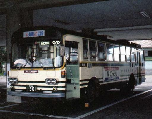 Izuhakone Bus Mitsubishi MR410 at Izu-nagaoka Sta.